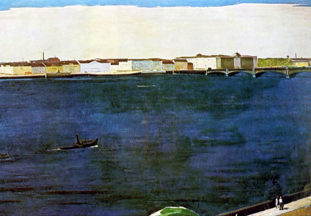 А. Е. Карев. Нева. Х., м., 173х116 см